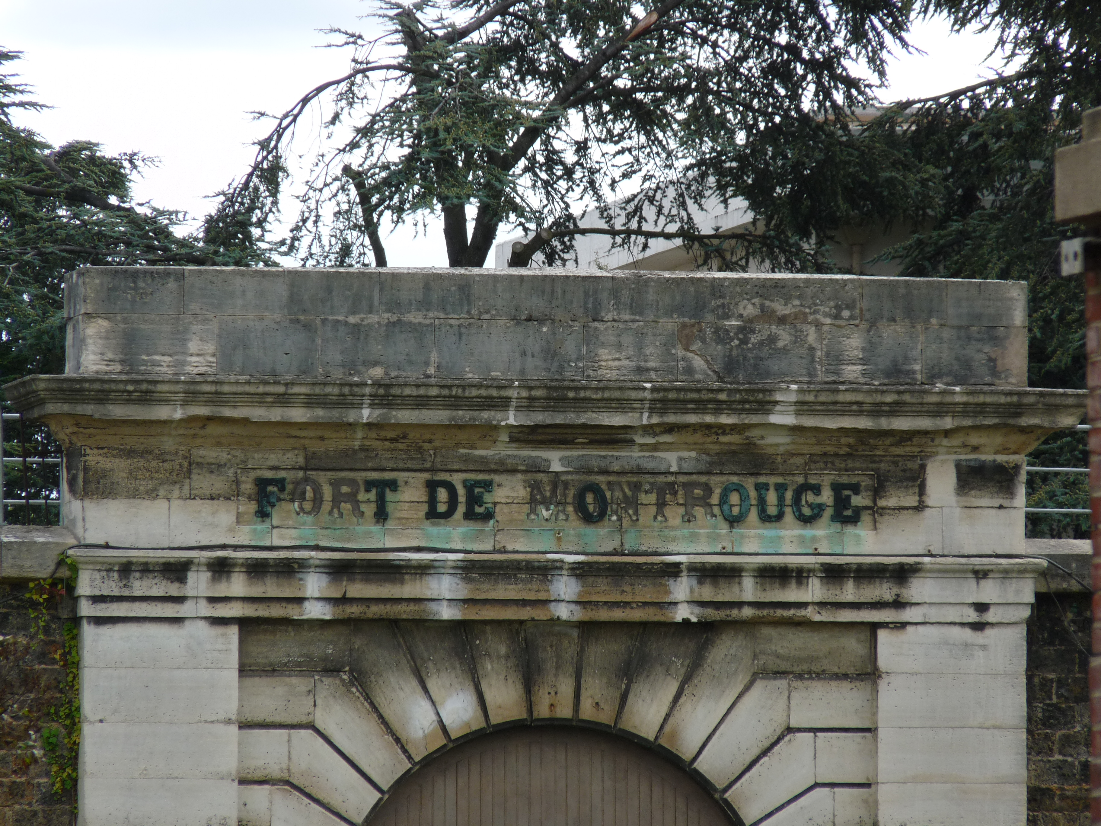 Porte du fort de Montrouge, vue depuis l'avenue Marx-Dormoy